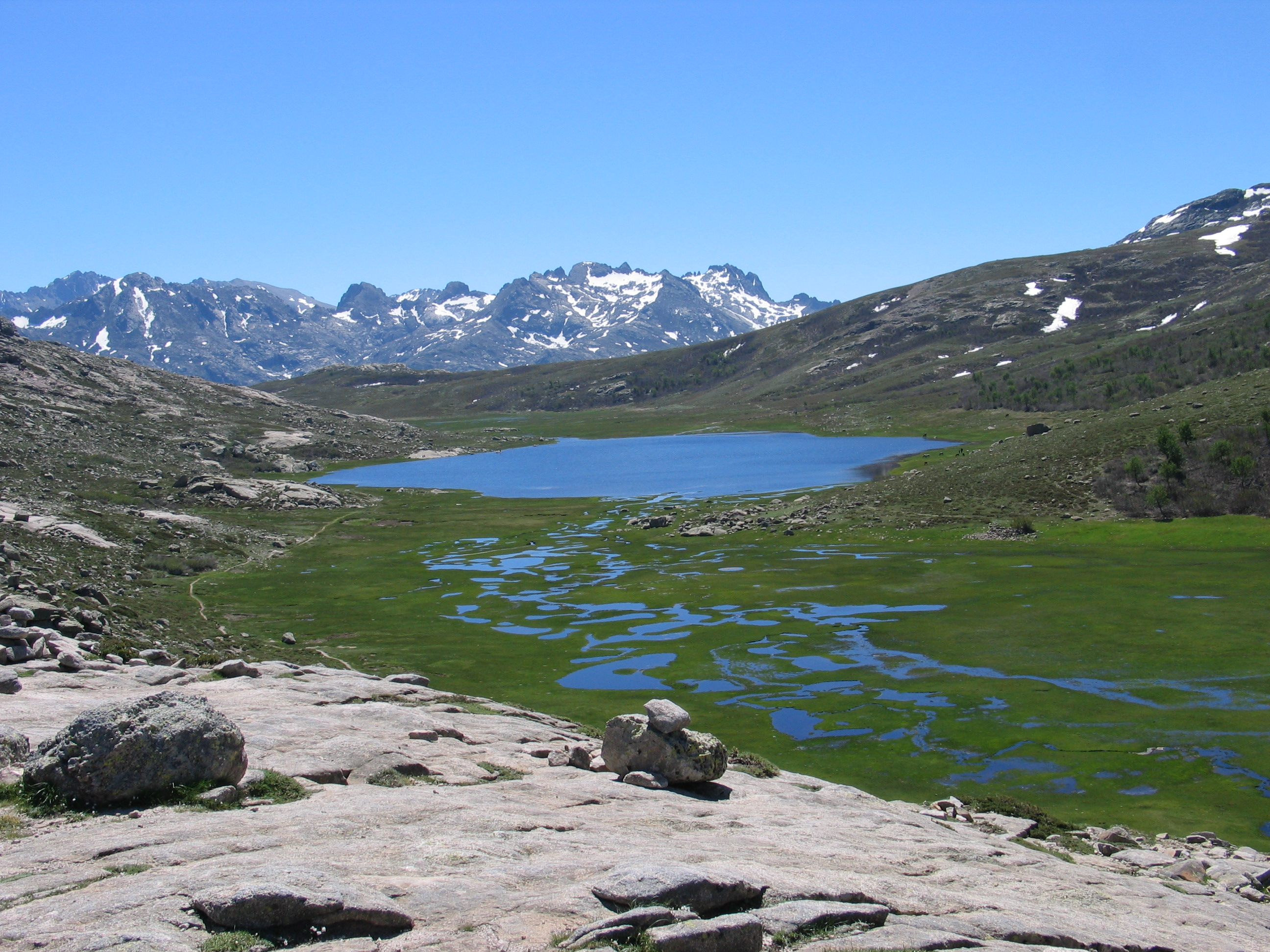 Lac de Nino